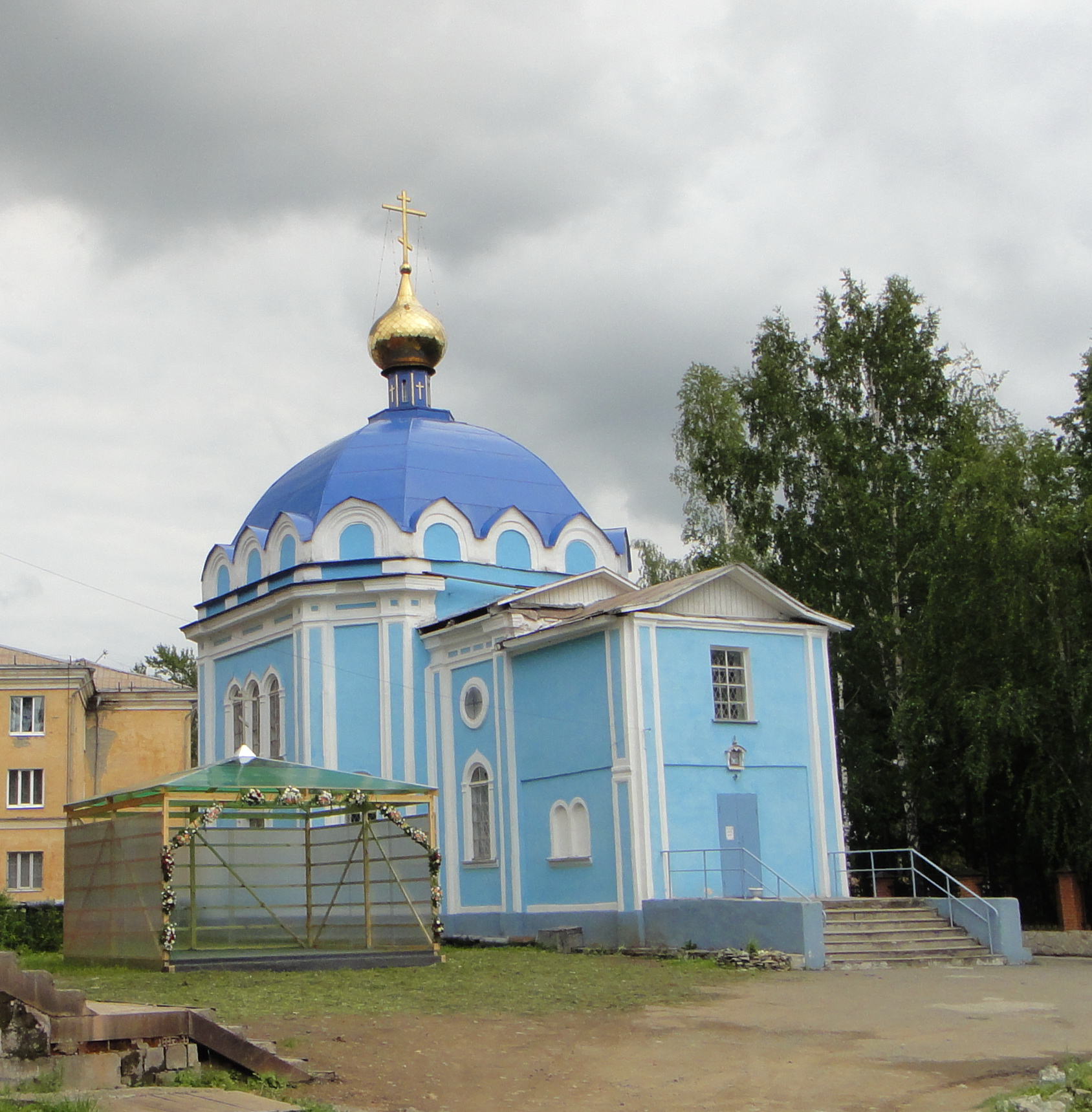 часовня (Скорбященская церковь) (Свердловская область, Нижний Тагил, улица Красногвардейская, 55)